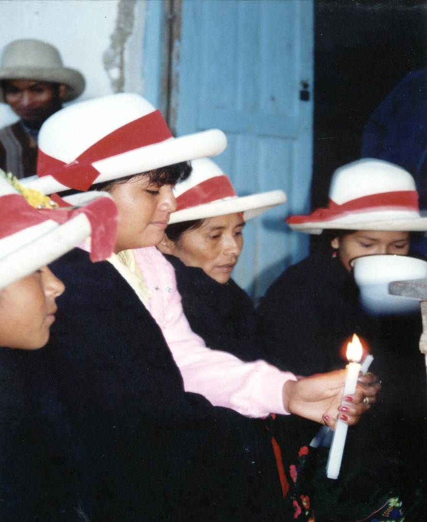 Es el brindis de la chicha, esta representaría la sangre de Jesús.